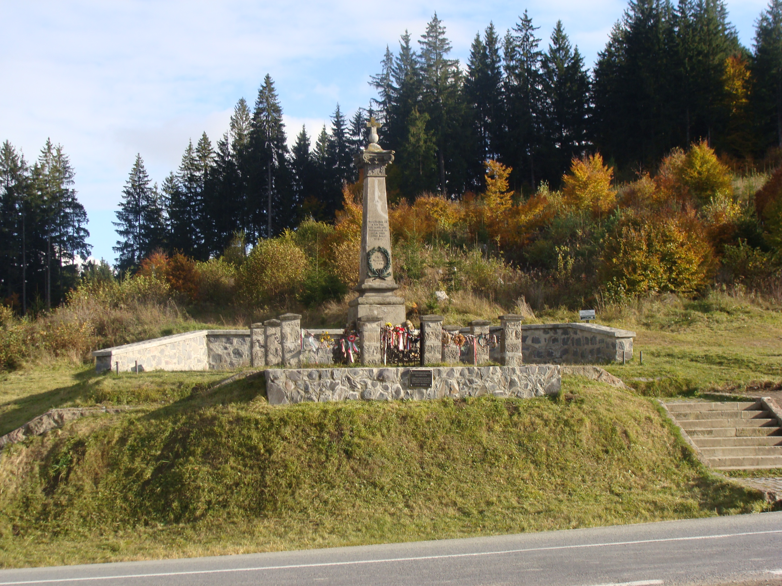 Az 1848-as emlékmű a Nyerges-tetőn, Hargita megyében, Erdélyben, Romániában.